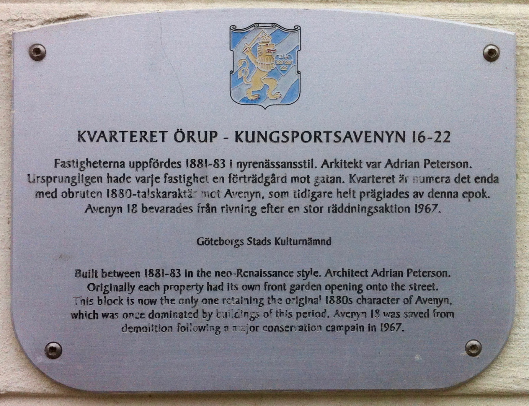 Kvarteret Örup, plakett, Kungsportsavenyn 16-22 i stadsdelen Lorensberg, Göteborg. Plaketten sattes upp som en del av Göteborgs stads kulturnämnds "Projekt Husmärkning" kring åren 2000-2001 där drygt hundra skyltar ingick. Se även boken "100 utmärkta hus i Göteborg". Vid en inventering av kommunen gjord 2016 satt 69 skyltar fortfarande uppe.